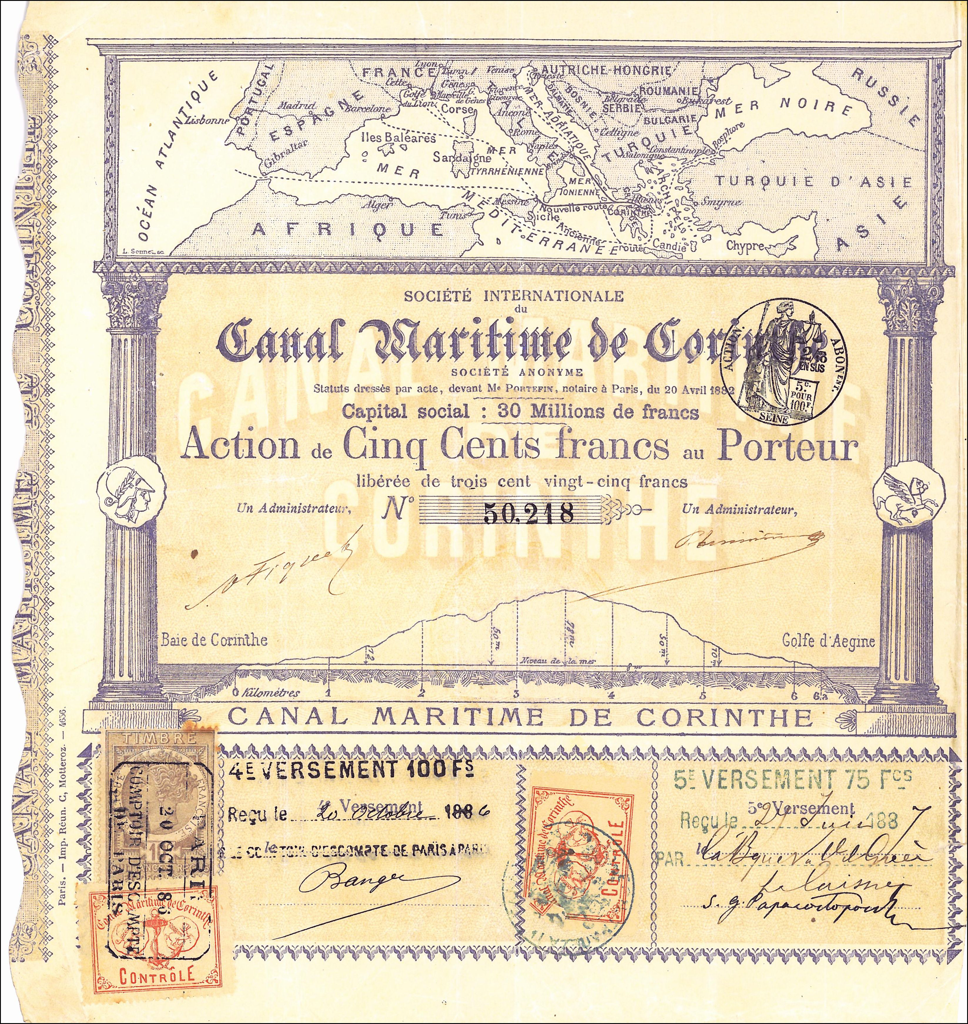 Inhaberaktien (Actions au Porteur) über je 500 französische Goldfranken der Société Internationale du Canal Maritime de Corinthe (Internationale Gesellschaft des Seekanals von Korinth)